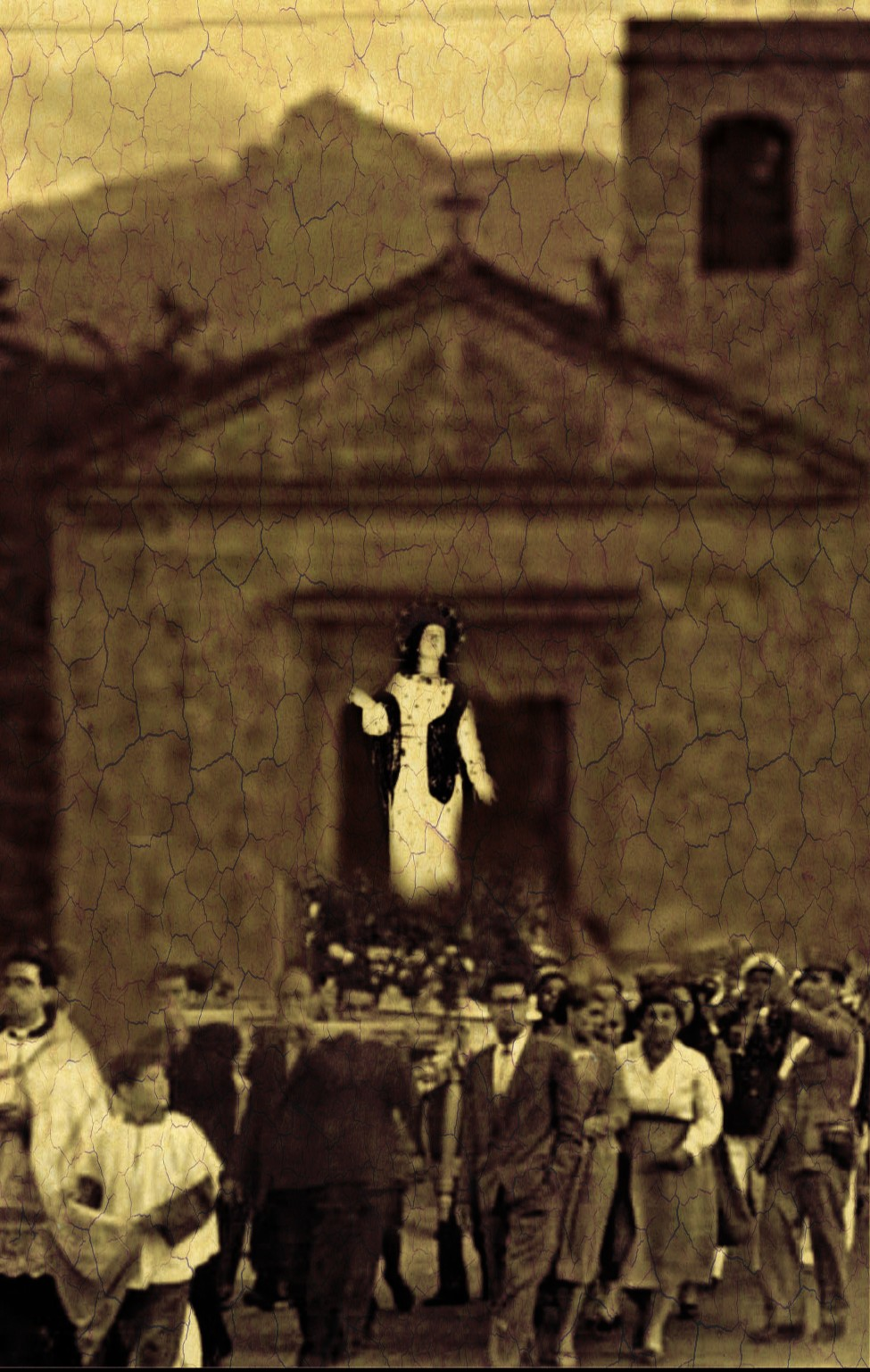 Disegno digitale raffigurante il 15 Agosto 1892, quando si inaugurava la sua prima chiesa e, in base alla descrizione di Oreste Calabrò, si "portava in trionfo la statua della santa".